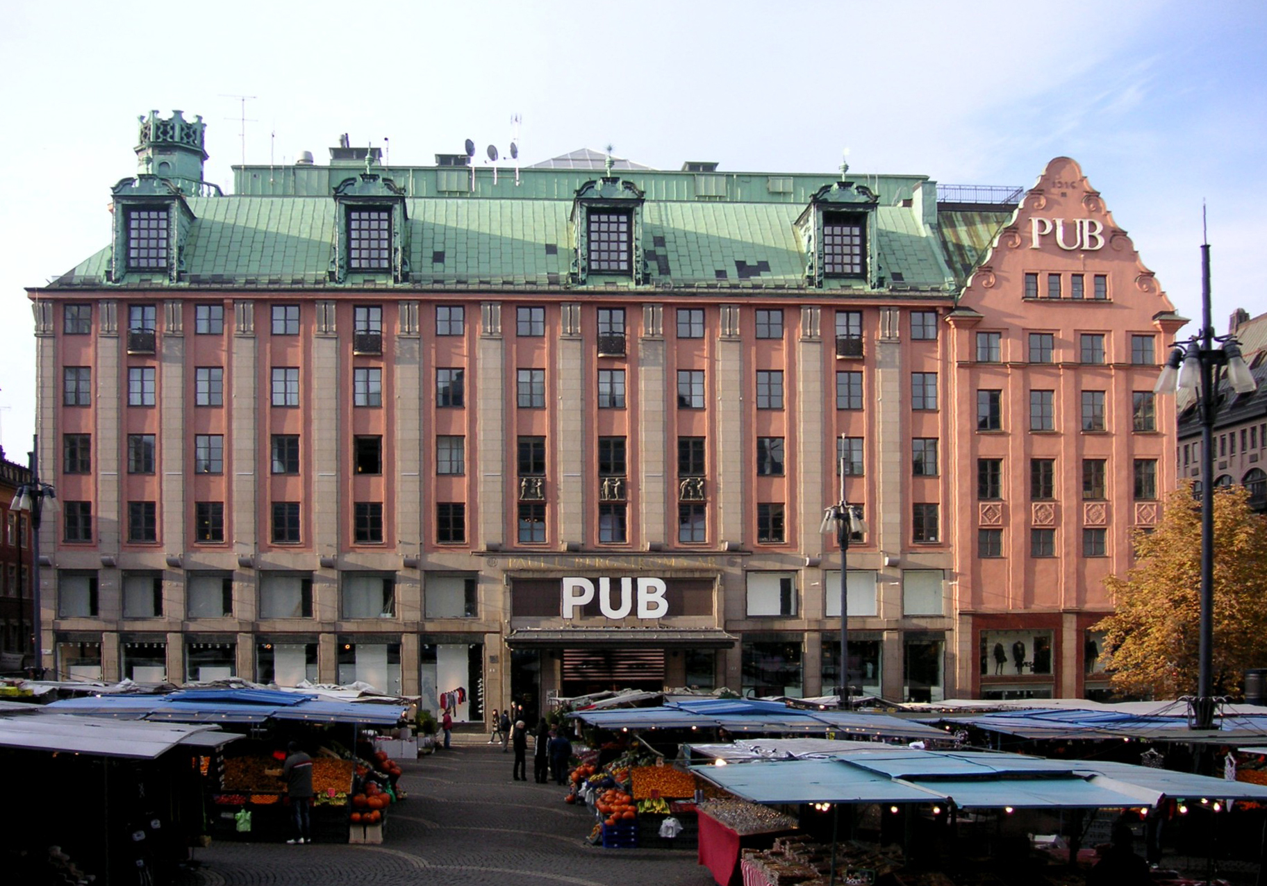 Varuhuset PUBs fasad mot Hötorget i Stockholm